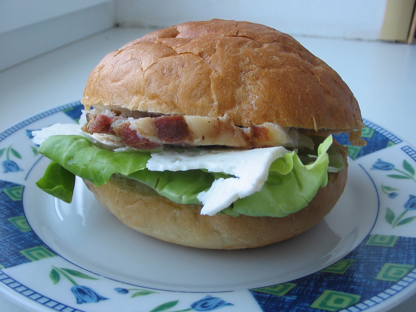 закритий бутерброд з розрізаної булки та скибок сиру, шинки і листя салату